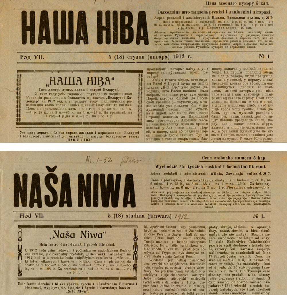 Наша Ніва. № , 1912 год. Першая старонка кірыліцай і лацінкай